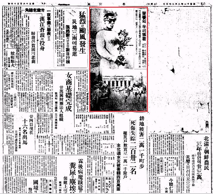 1936년 8월 25일자 동아일보 2면지에 실린 '일장기 말소 사건'